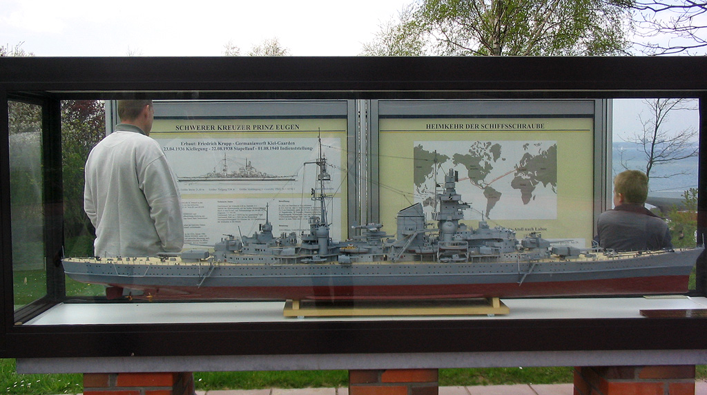 Beschreibung: Prinz Eugen Modell Fotograf: Darkone, 1. Mai 2004